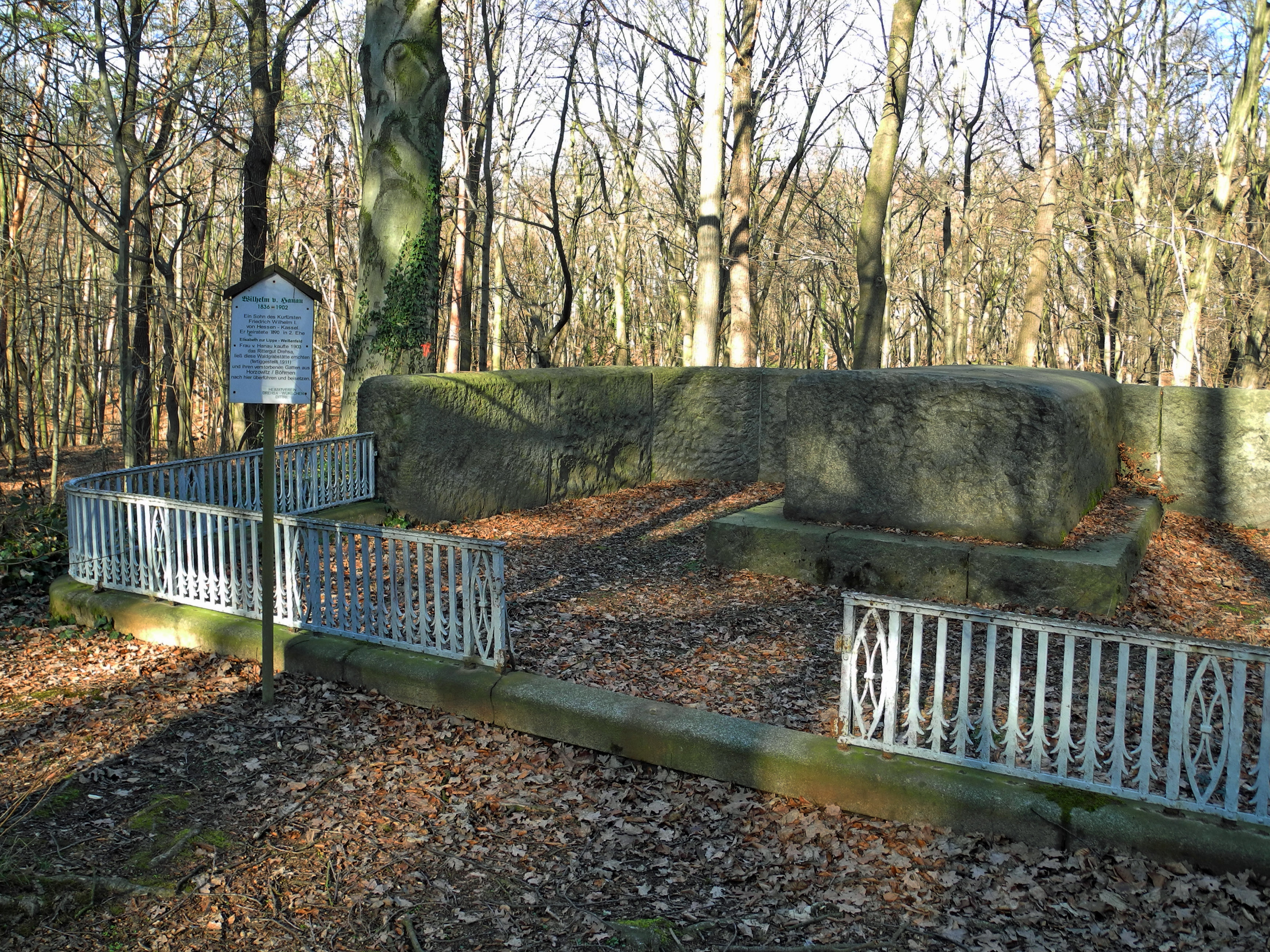 Fürstengrab Wilhelm von Hanau (1836–1902)